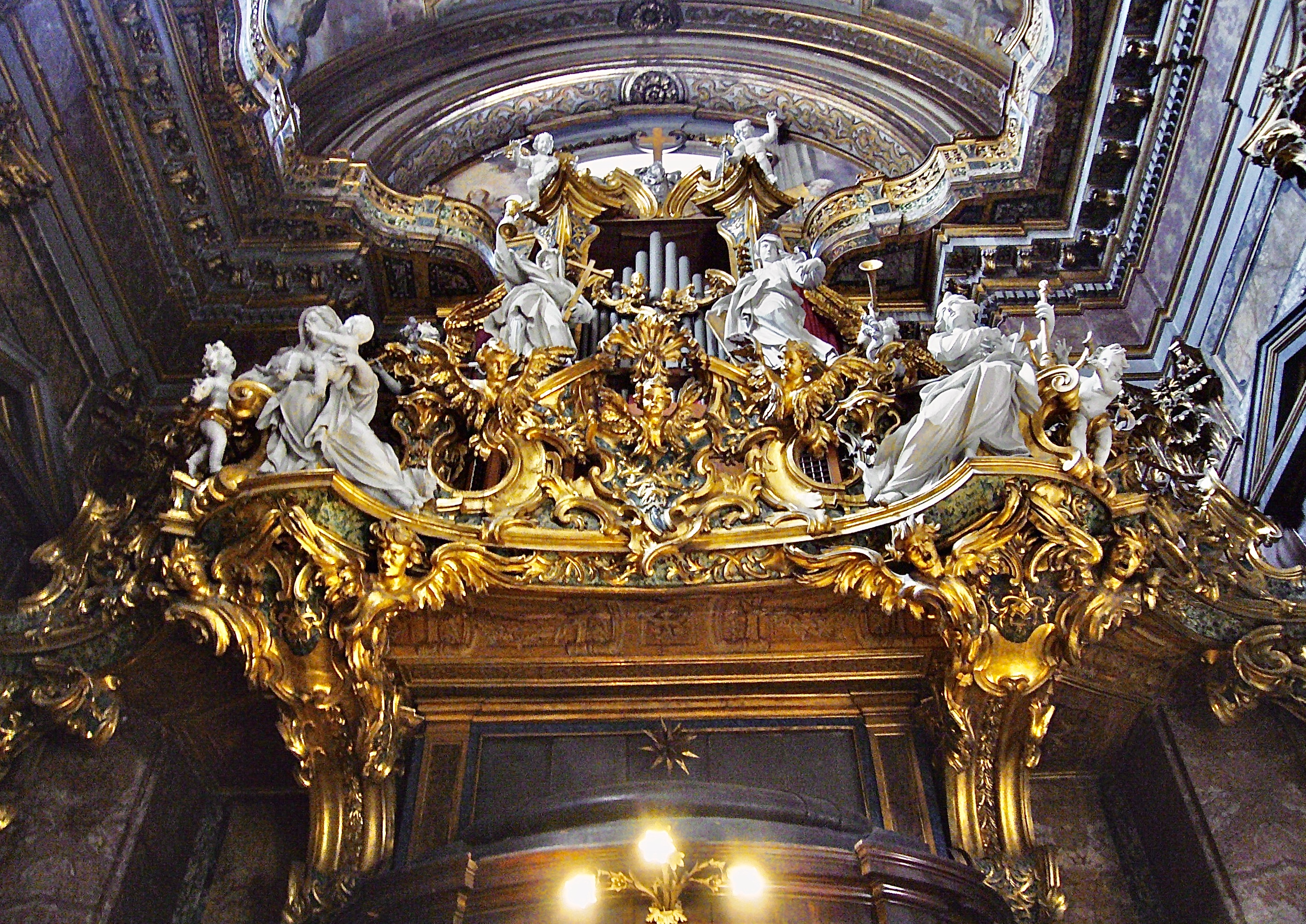 Cantoria ed organo